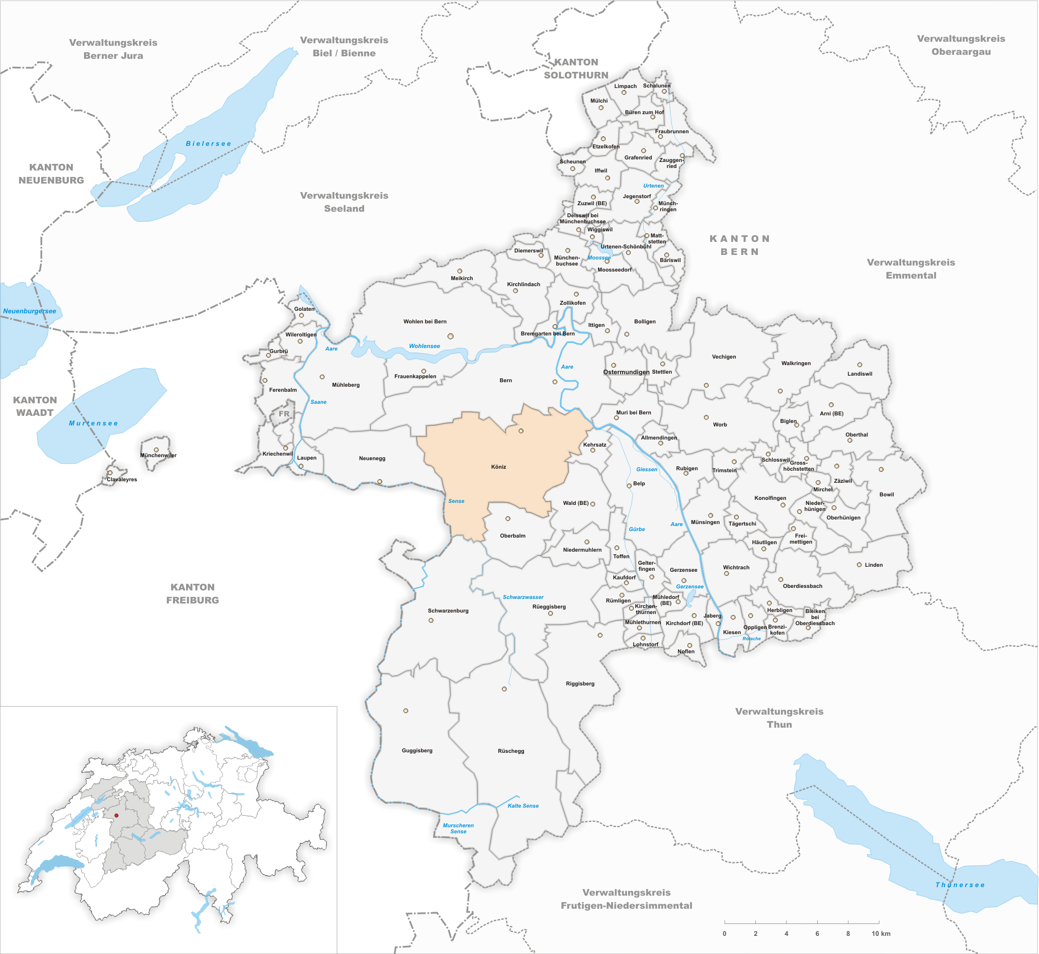 Municipality Köniz